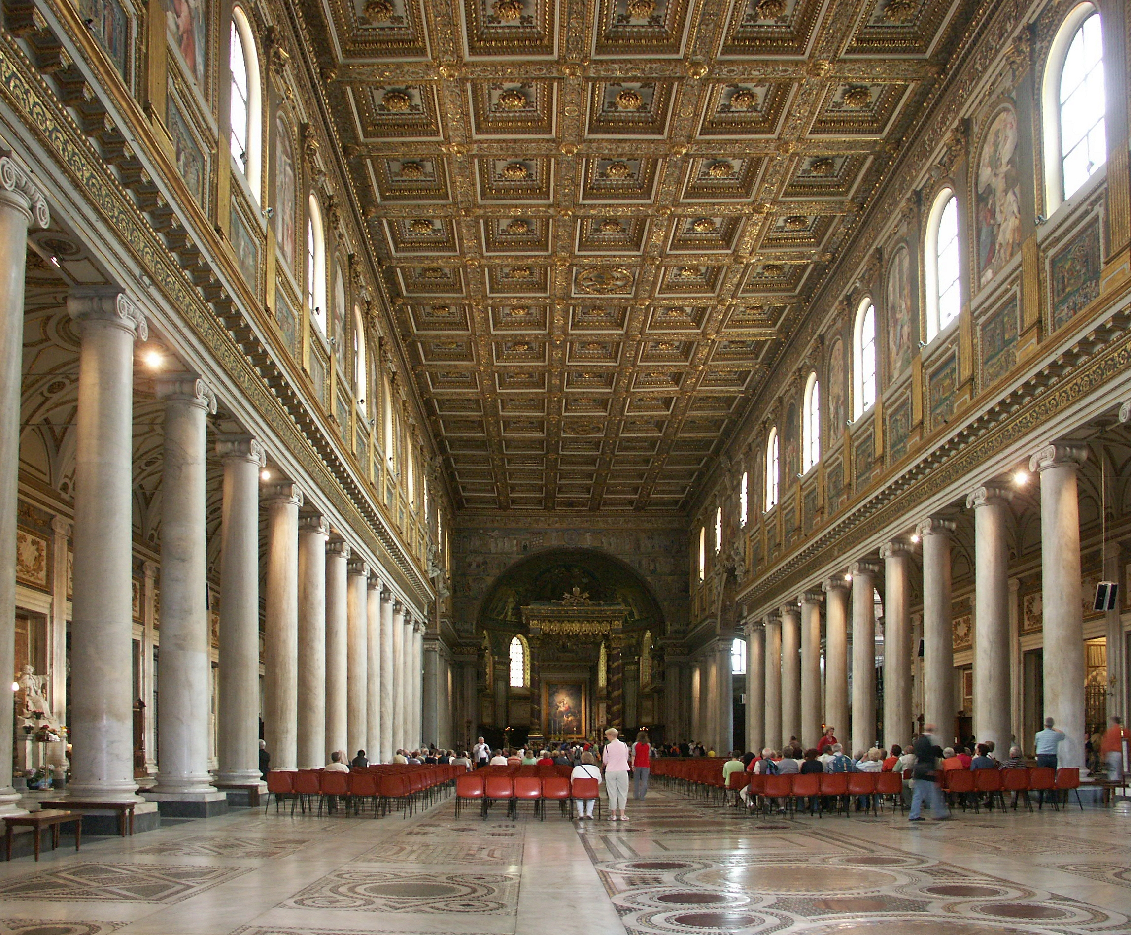 Rom, Basilika Santa Maria Maggiore, Innenansicht